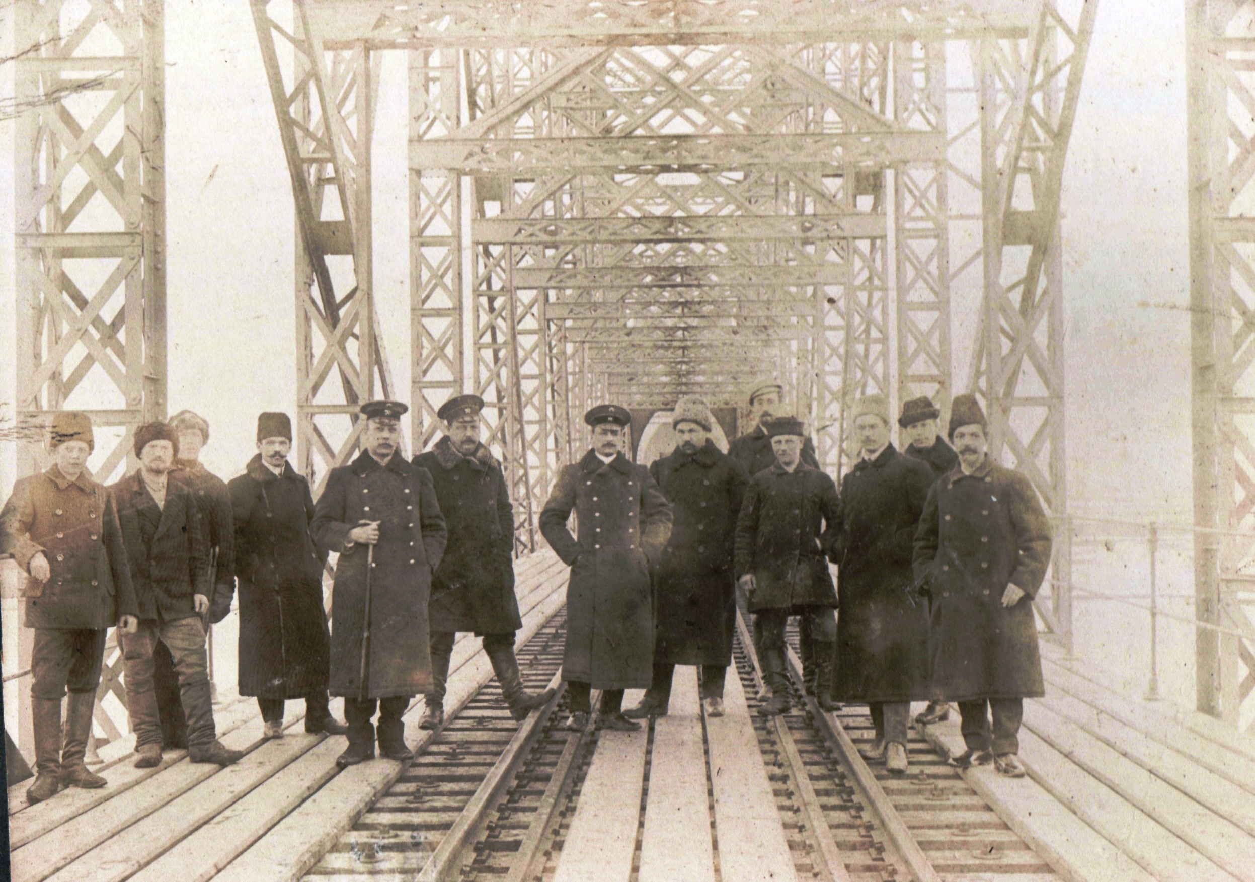 Строители железнодорожного моста через Оку. Муром, 1910.